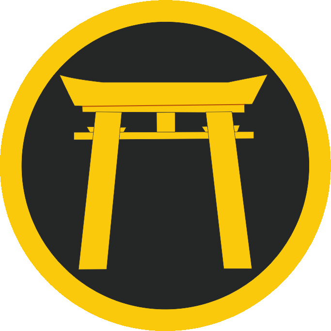 미국 류큐 열도 육군의 어깨 소매 인식표 (1946년 7월 1일 ~ 1972년 5월 15일)